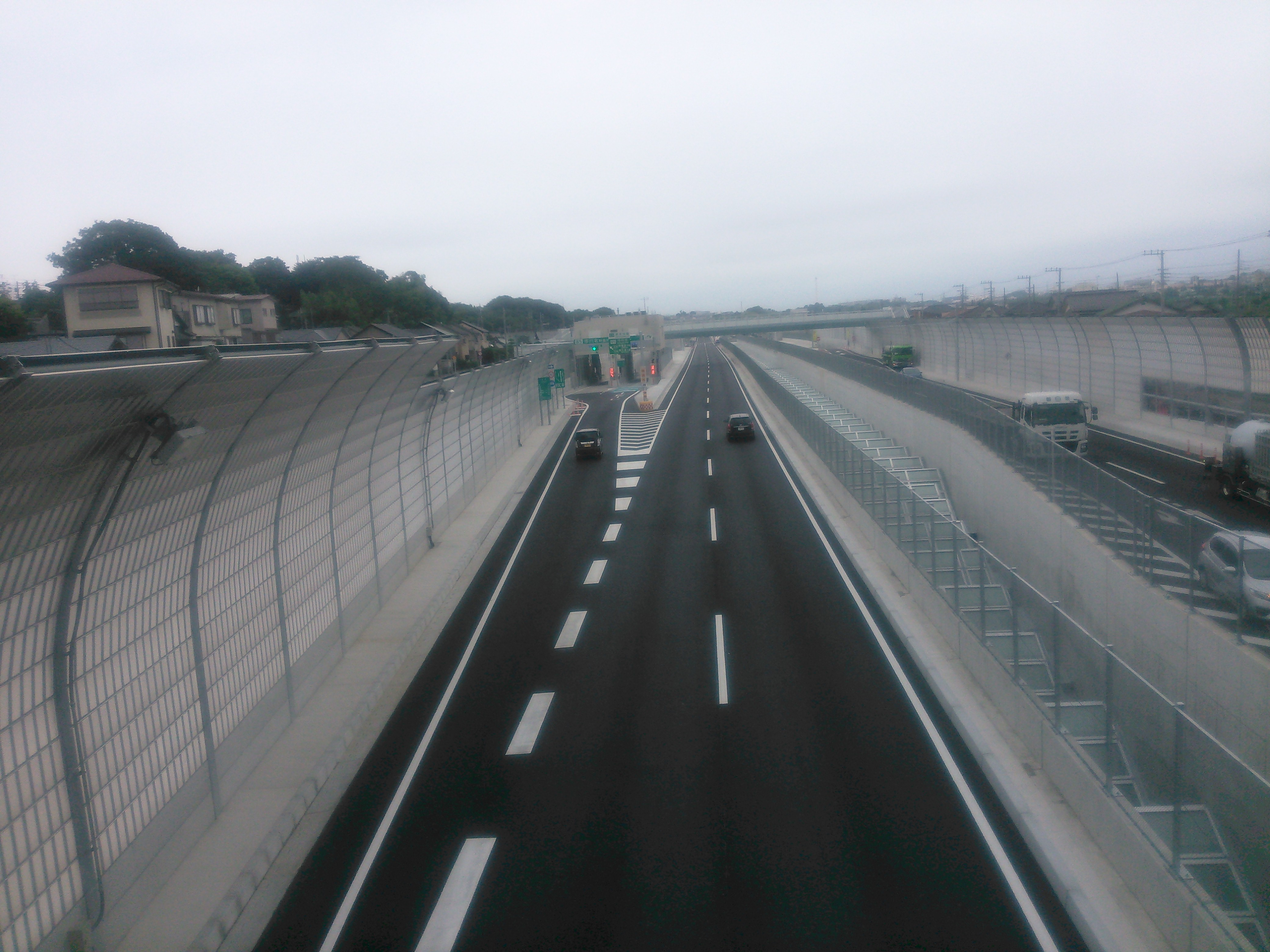 千葉県市川市。国道298号と東京外環自動車道が接続する市川北インターチェンジ。大泉JCT方面への入口料金所。 中文